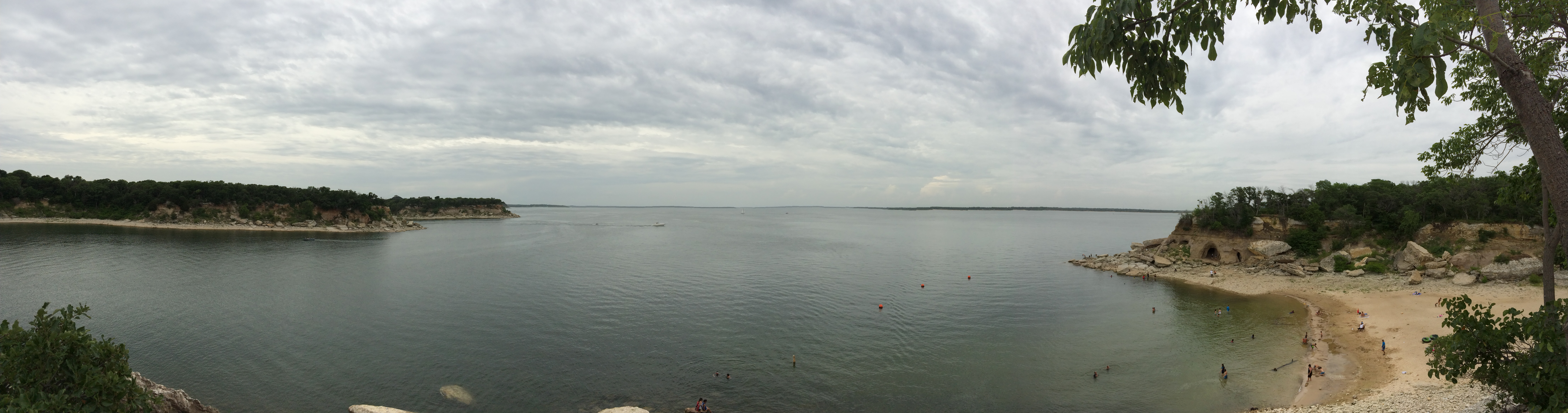 Eisenhower State Park